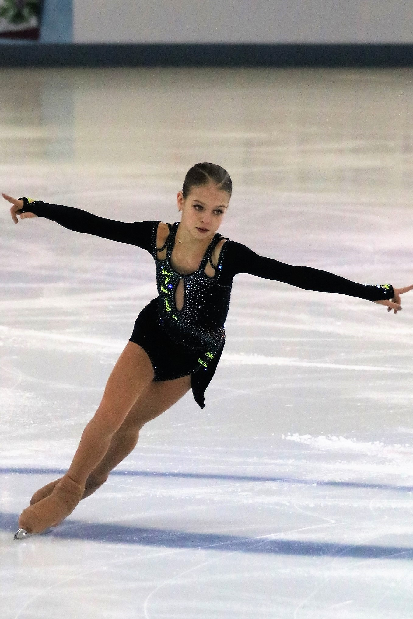 Александра Трусова на чемпионате России по фигурному катанию на коньках 2019